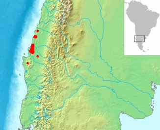 Mapa de distribución de la especie Gomortega keule.